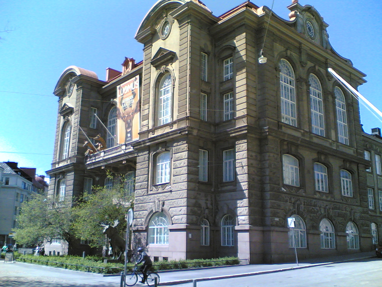 Arkadiankatu